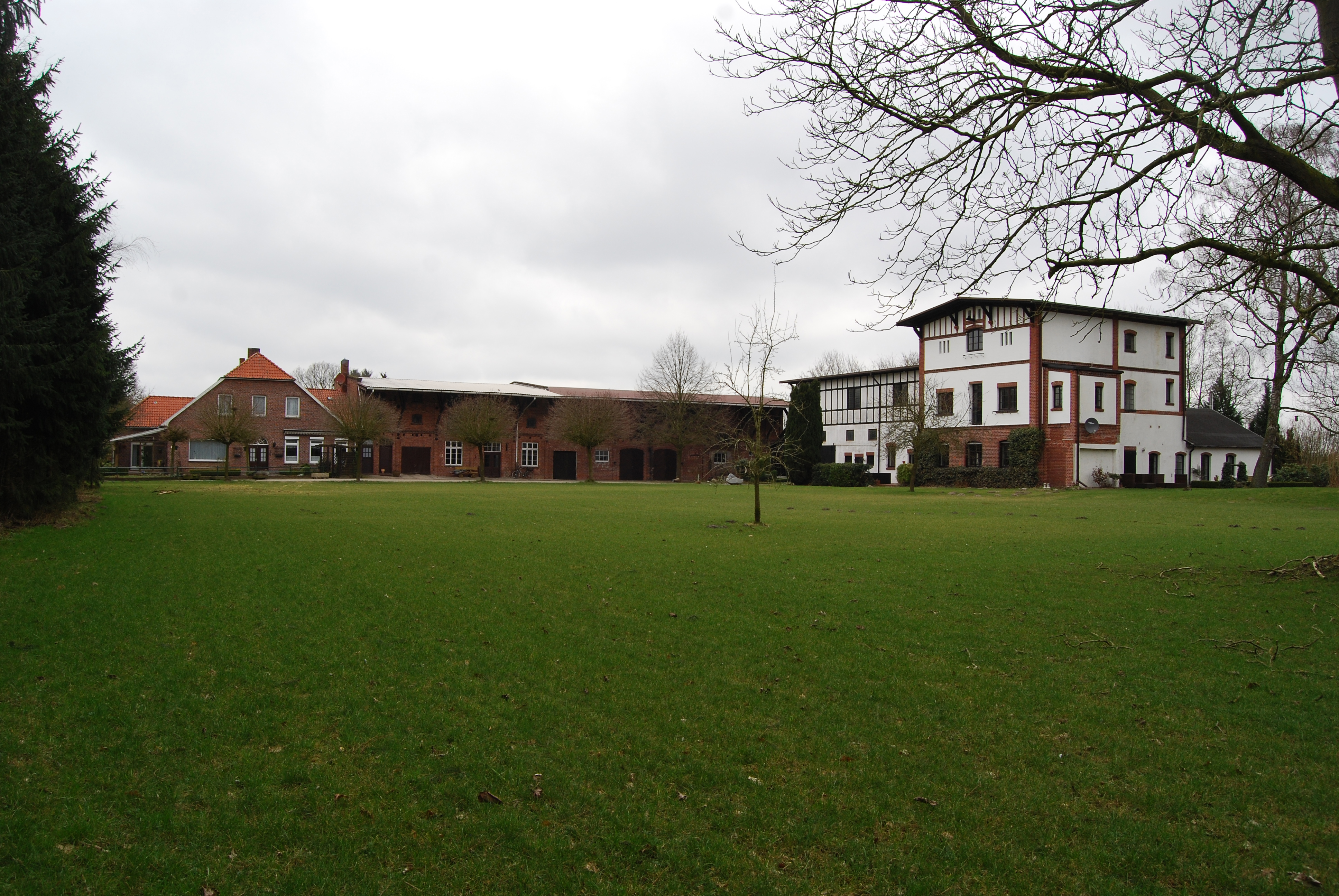 Moorgut Karlshof Gesamtansicht